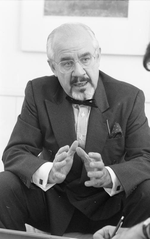 Bonn, 15. Januar 1990 Der Chef des Presse- und Informationsamtes der Bundesregierung, Bundesminister Hans Klein, gab Herrn Jürgen Liminski vom "Deutschland-Magazin" ein Interview.